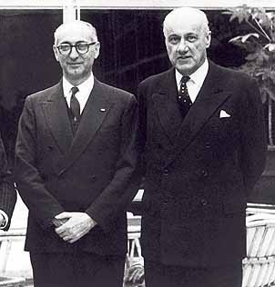 Arturo Frondizi durante una visita a Chile en 1961 es recibido por el Presidente Jorge Alessandri. La foto fue publicada por el Diario argentino La Nación.